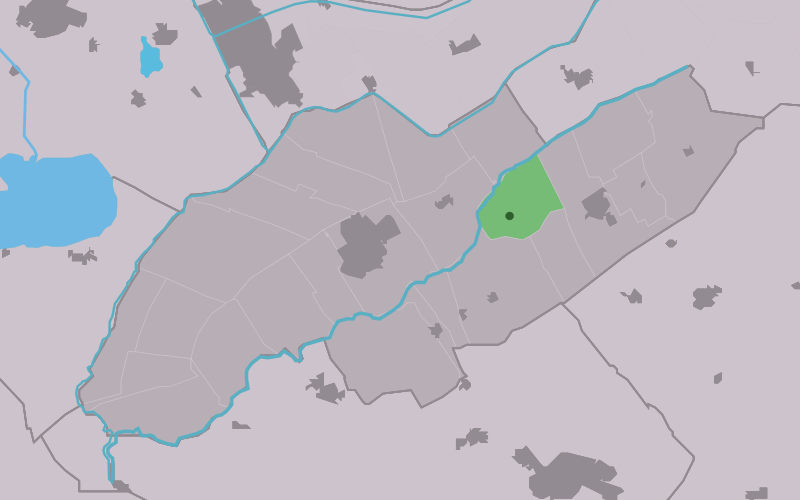 Kaartsje fan himrik fan De_Hoeve